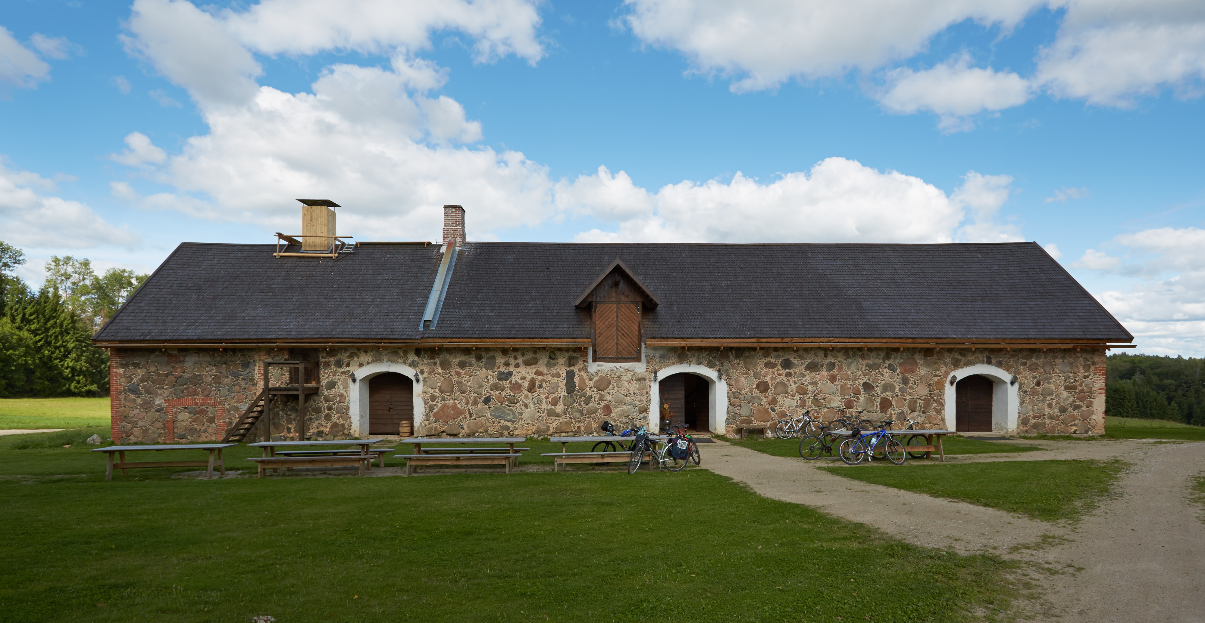 Varbuse mõisa ait-kuivati 2013. aasta augustis.